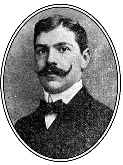 Aristide Blank - director al băncii Marmorosch-Blank, România, 1910